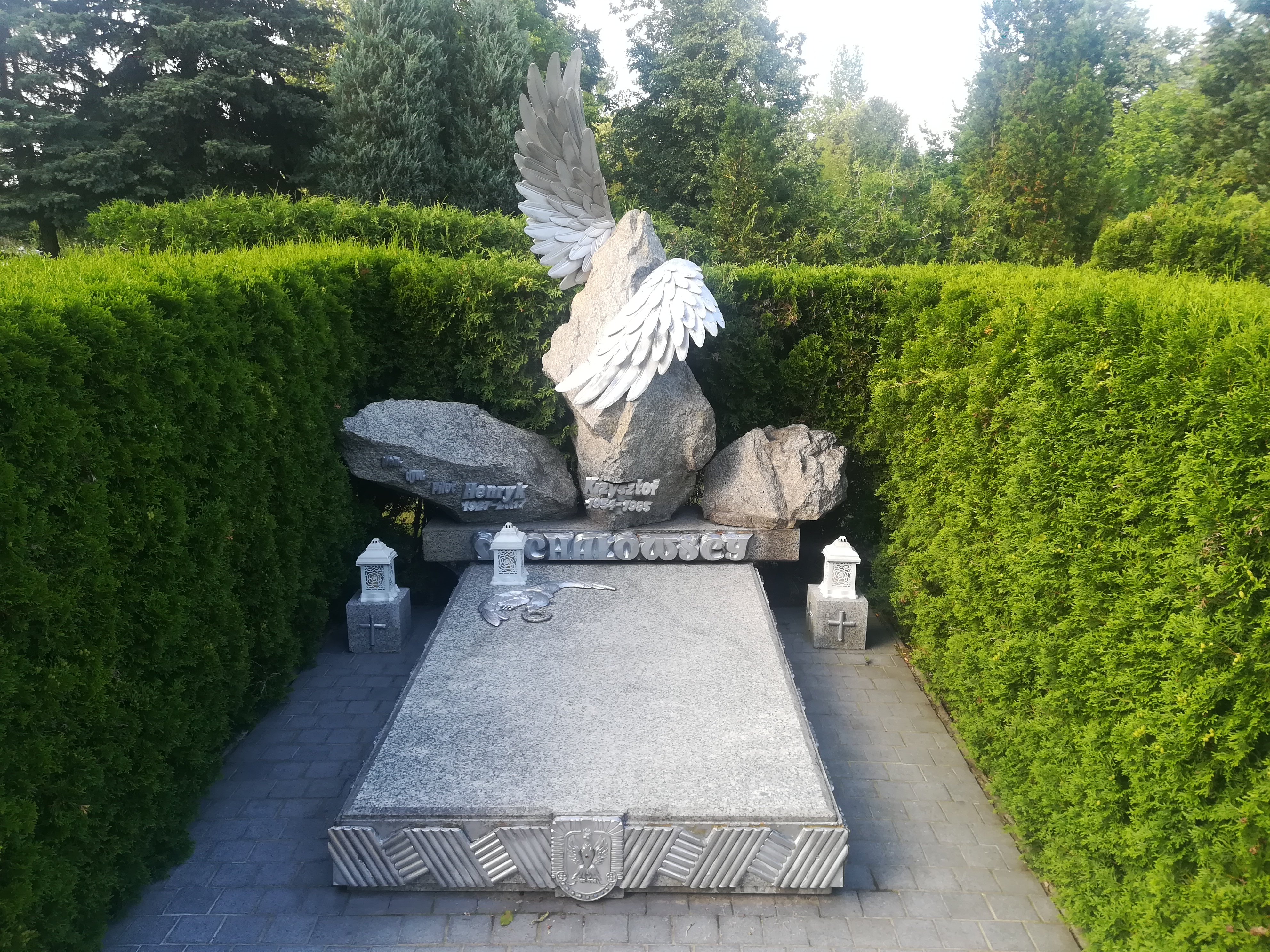 Grób gen. Henryka Michałowskiego - cm. junikowski w Poznaniu.